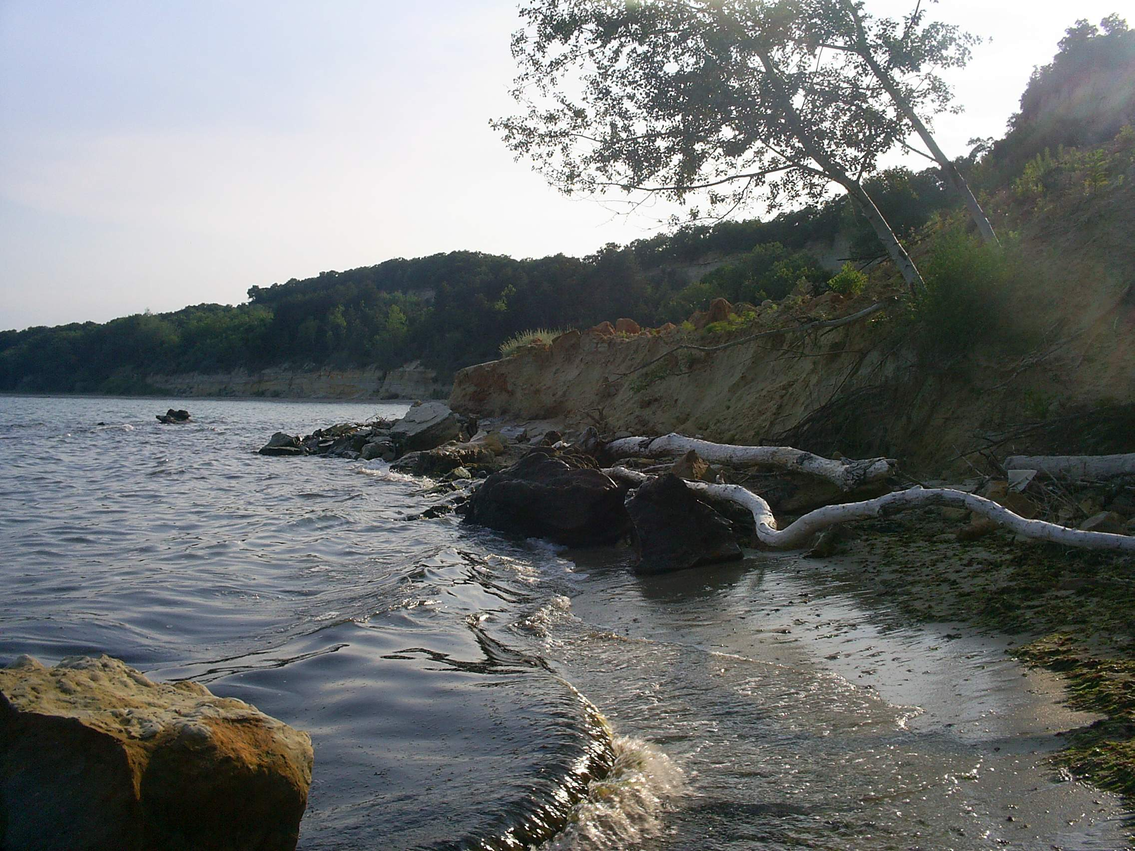 Залив в северната част на Камчия; © 2006 Свилен Енев